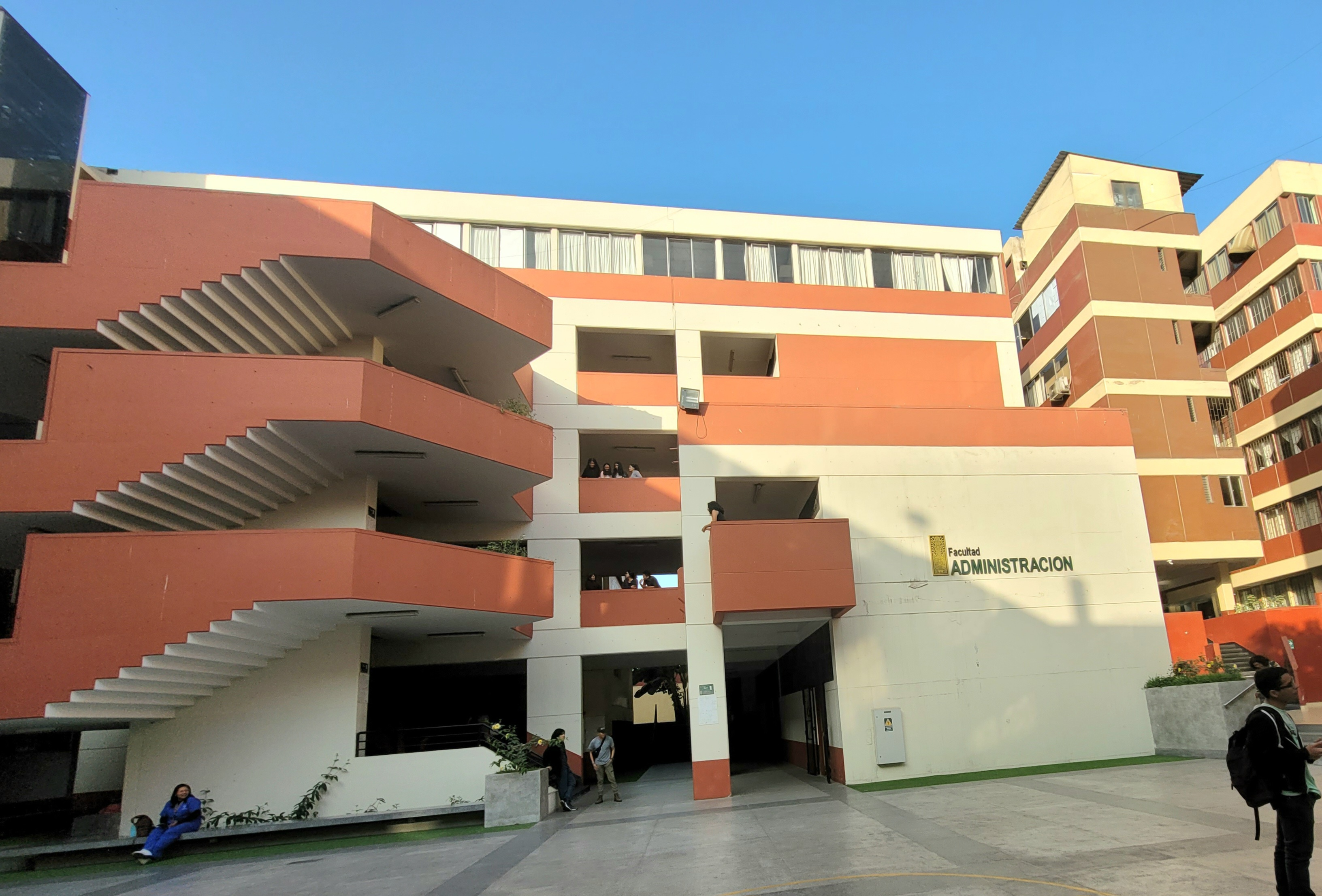 Facultad de Administracion de empresas de la universidad Federico Villarreal